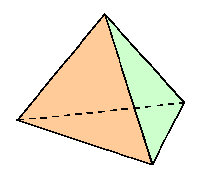 ruimtelijk figuur - eigen werk ism danielm